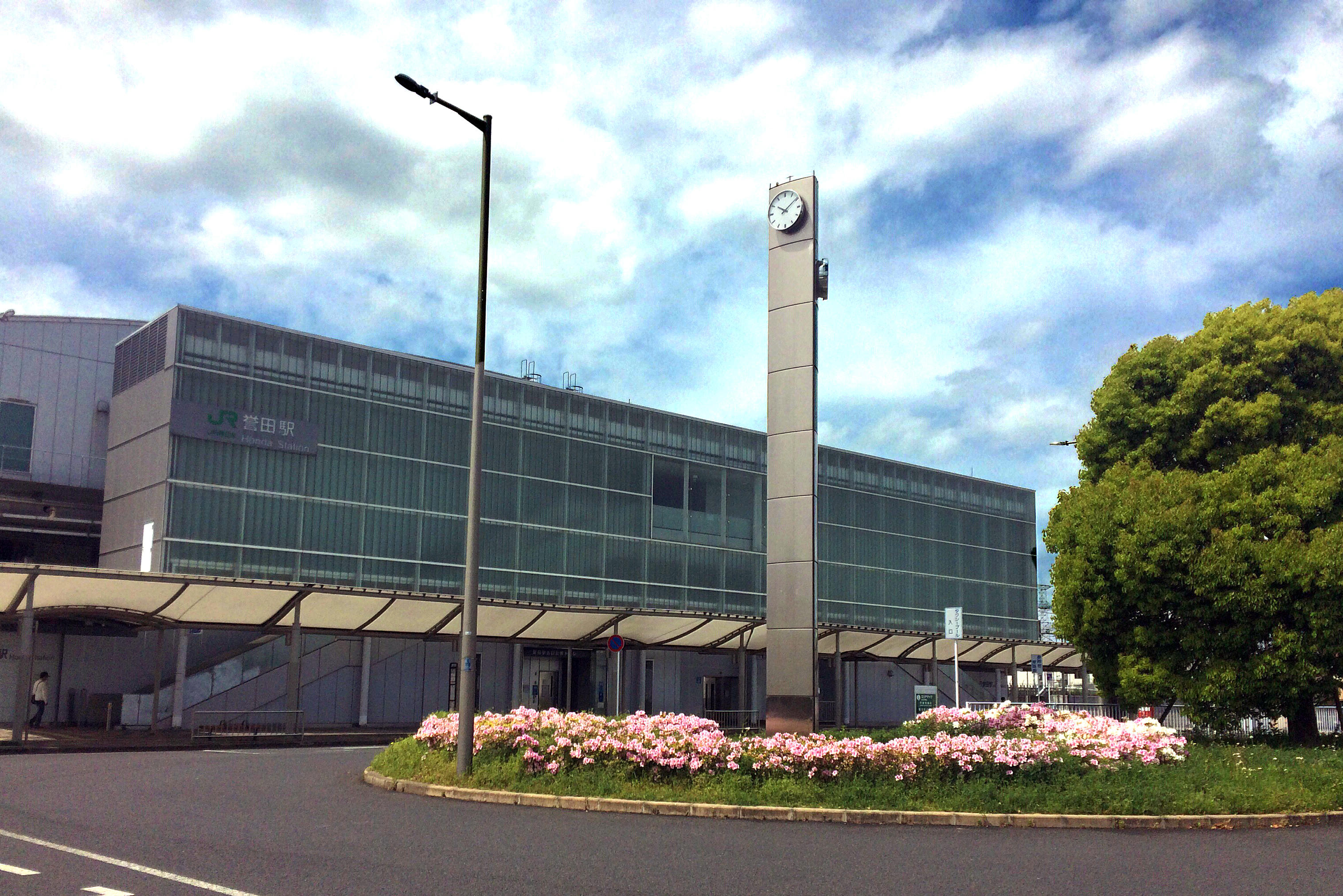 誉田駅駅舎